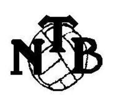 Tuse Næs Boldklubs logo